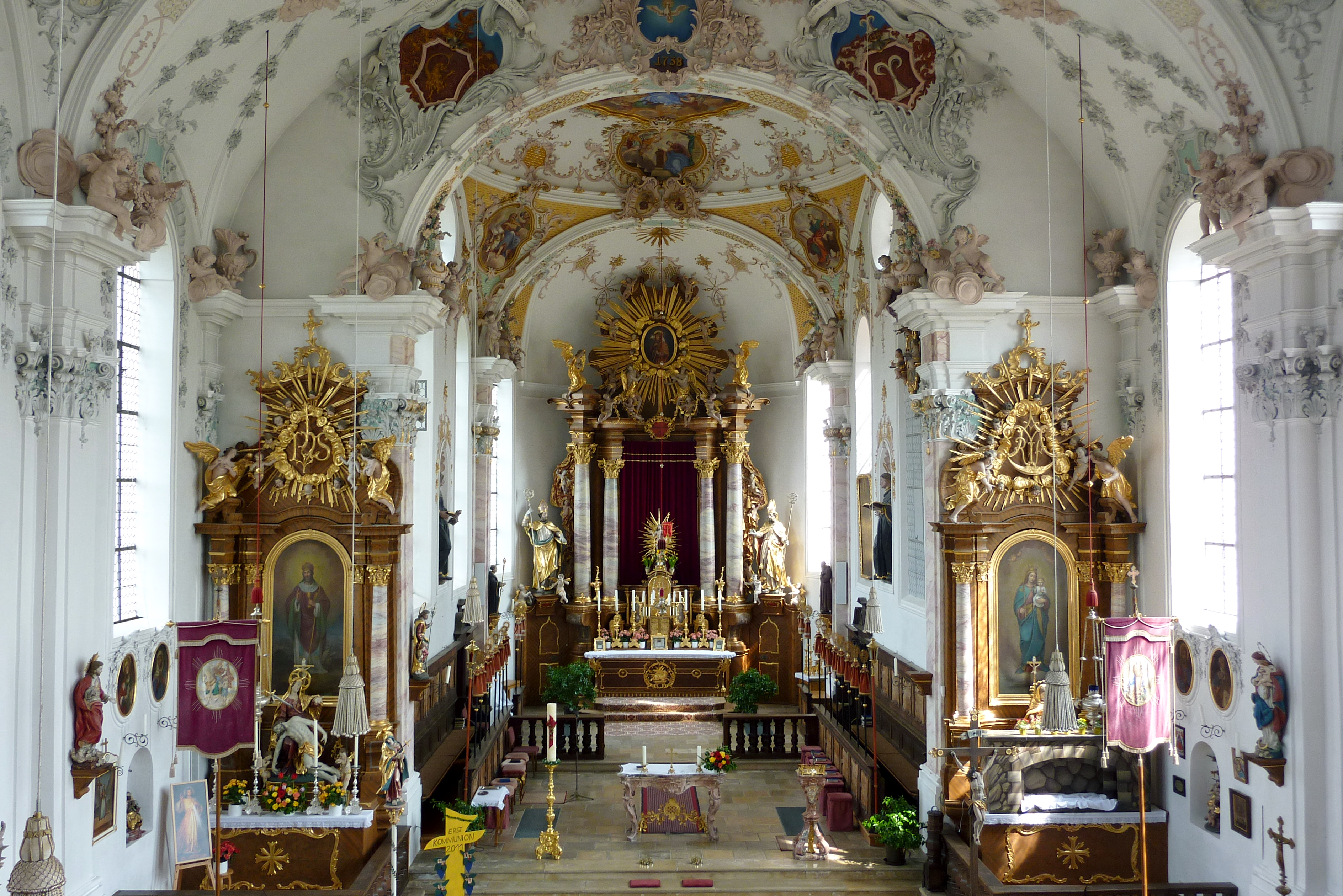 Katholische Pfarrkirche St. Martin in Gabelbach, einem Ortsteil von Zusmarshausen im Landkreis Augsburg (Bayern), Innenraum mit Blick zum Chor